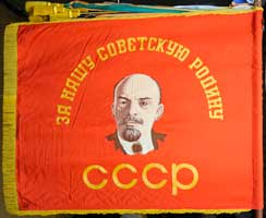 Боевое Знамя. 17-я гвардейская механизированная Краснознамённая бригада. (Оборотная сторона) левая